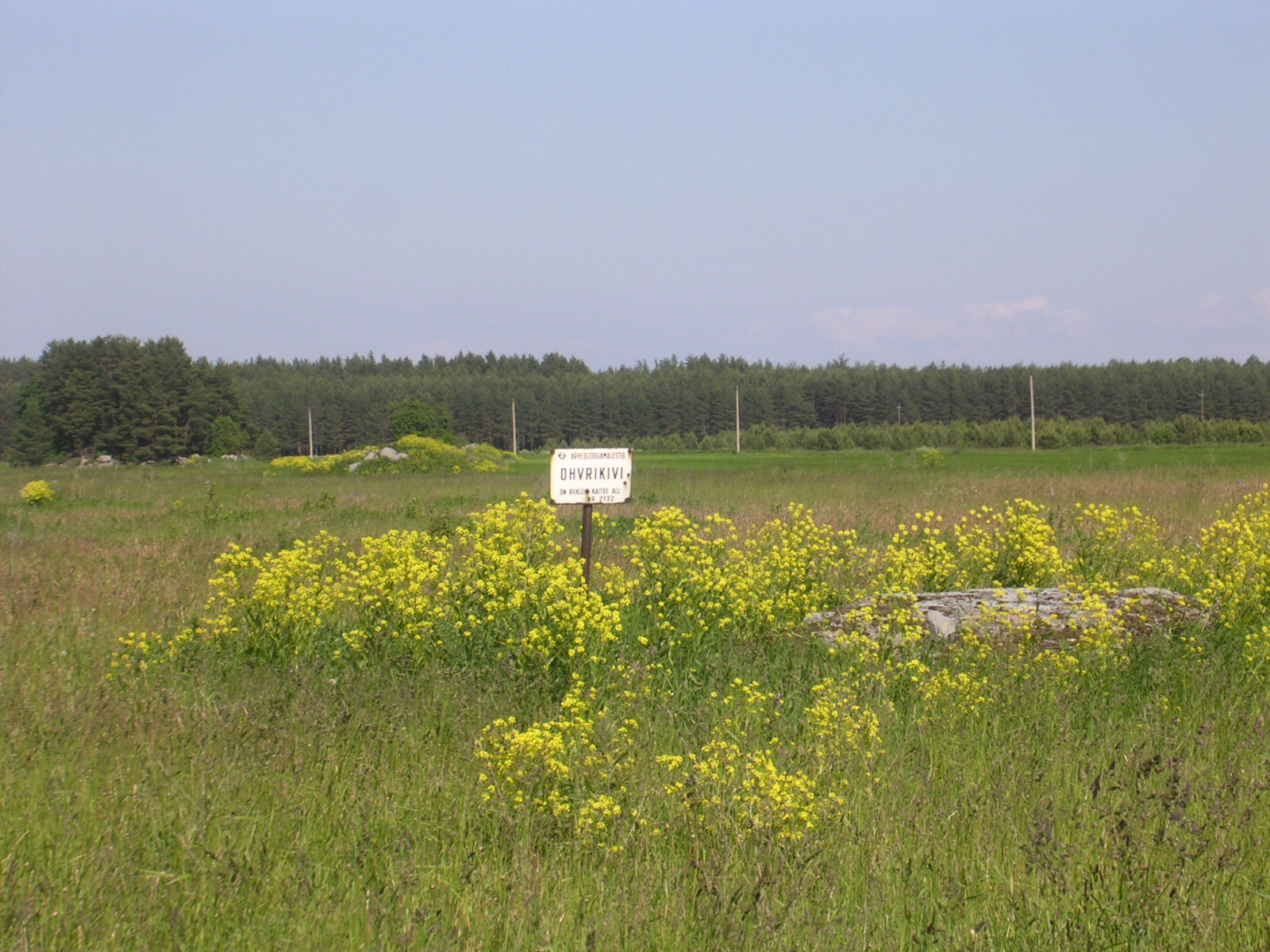 Ohvrikivi Varudi-Vanakülas